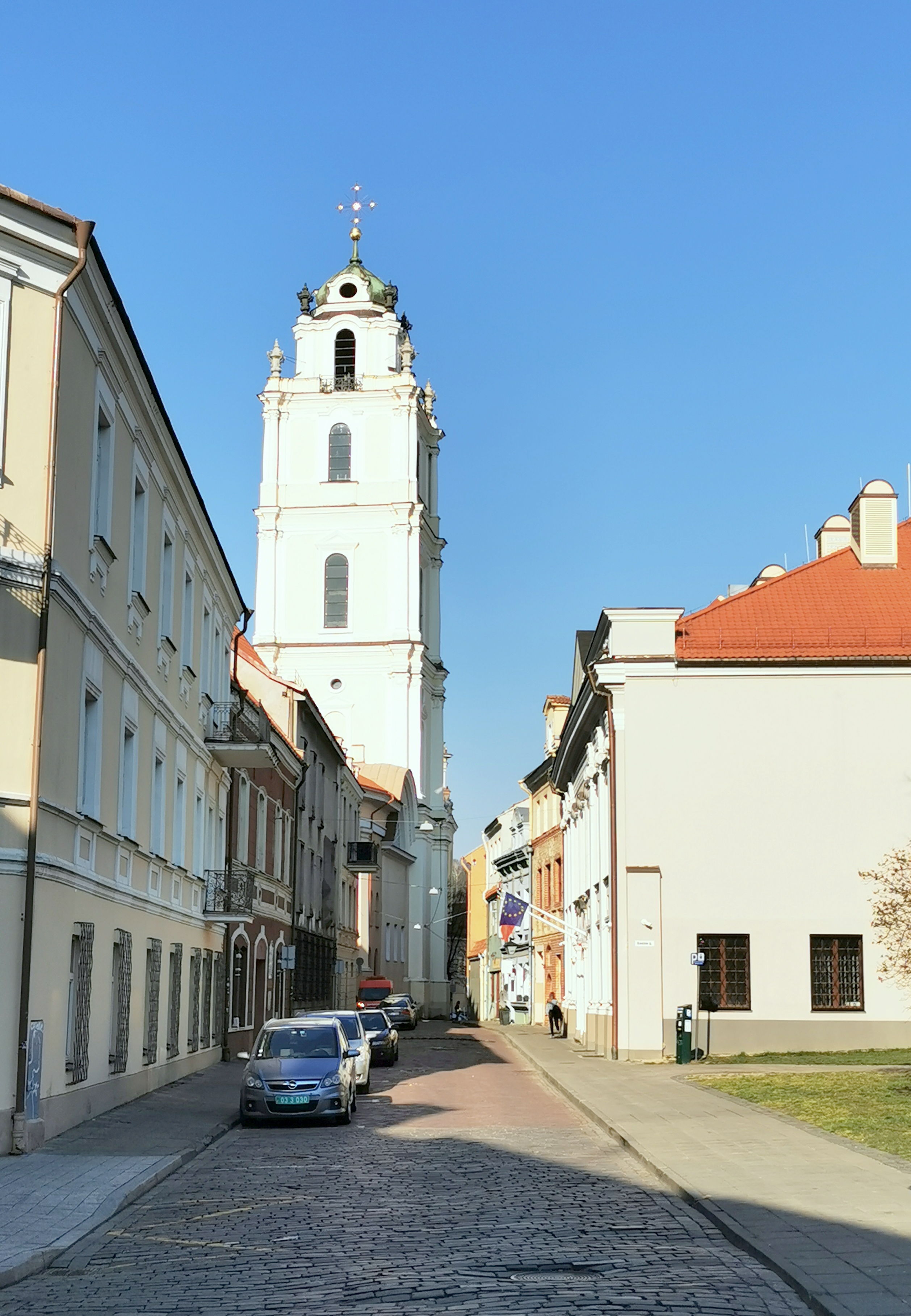 Švento Jono gatvė